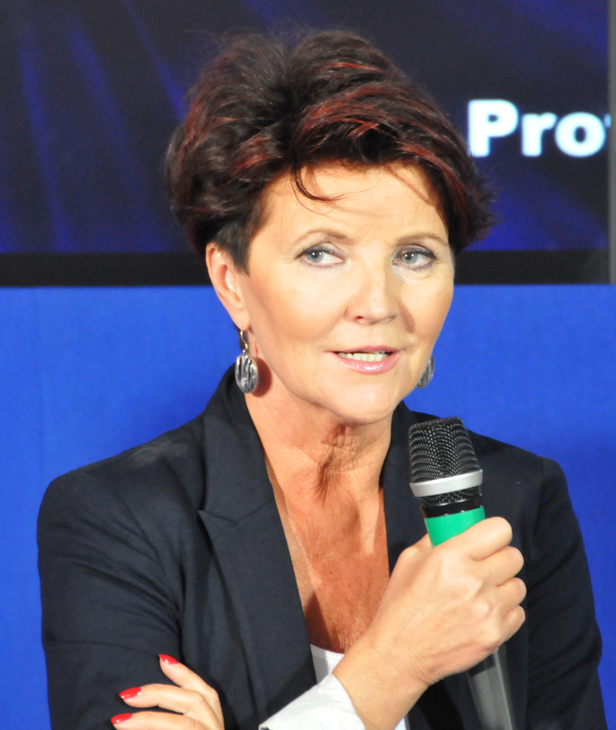 15.09.2011 Warszawa, prezentacja programu wyborczego prof. Alicji Chybickiej